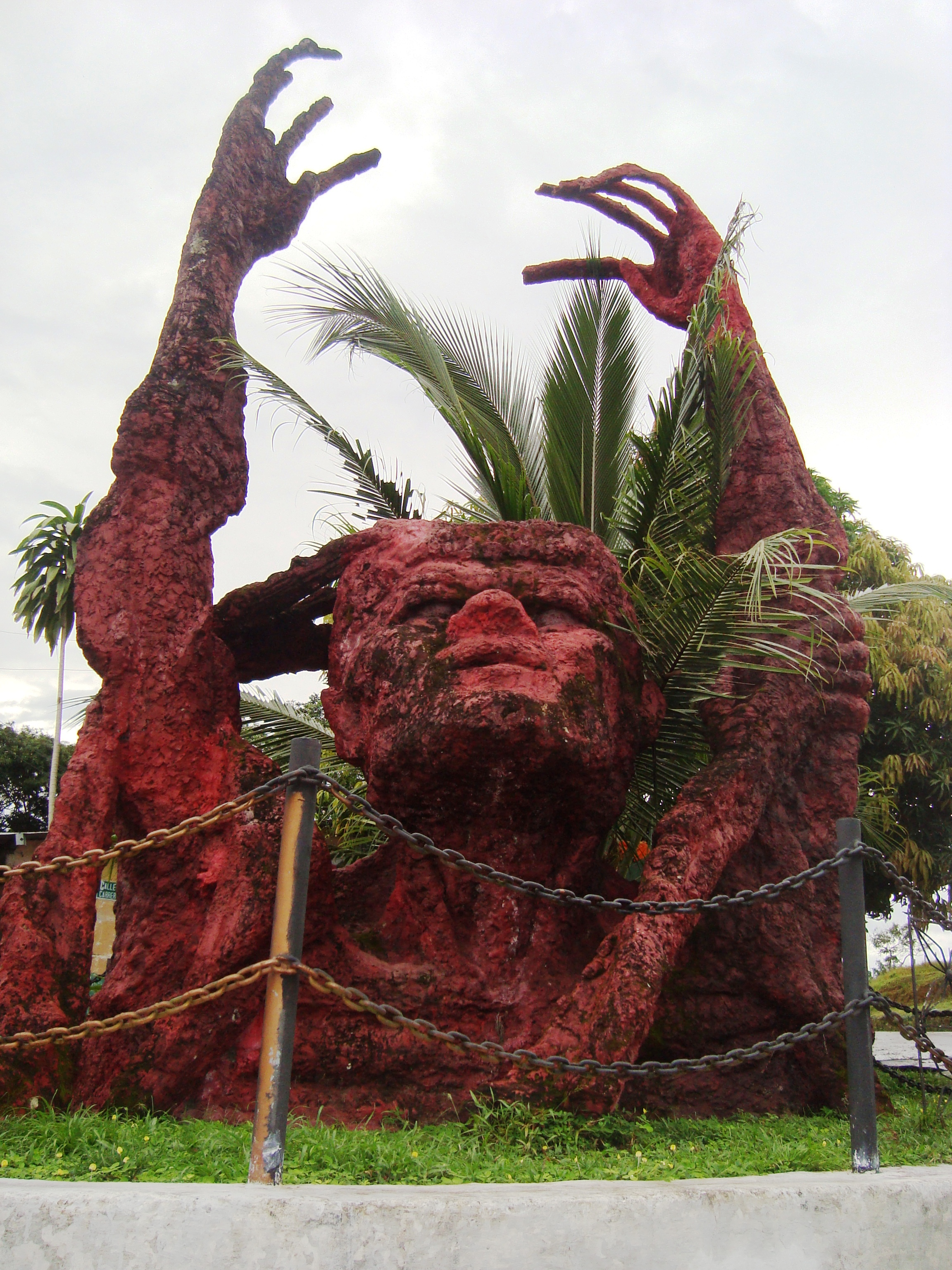 Monumento al Último Andaquí, obra de Emiro Garzón en Belén de los Andaquíes (Caquetá).